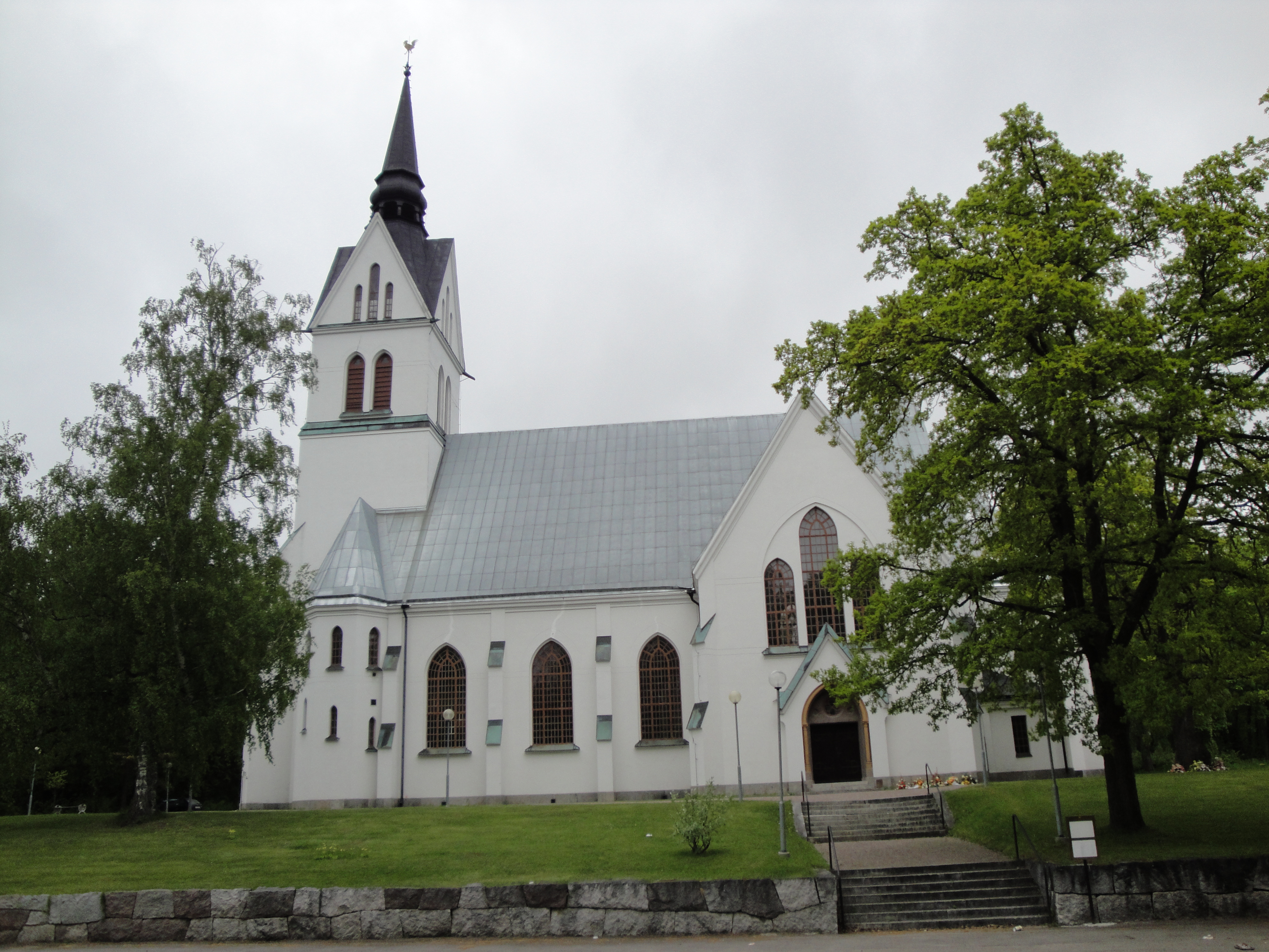 Skutskärs kyrka eller Johanneskyrkan, Älvkarleby kommun.